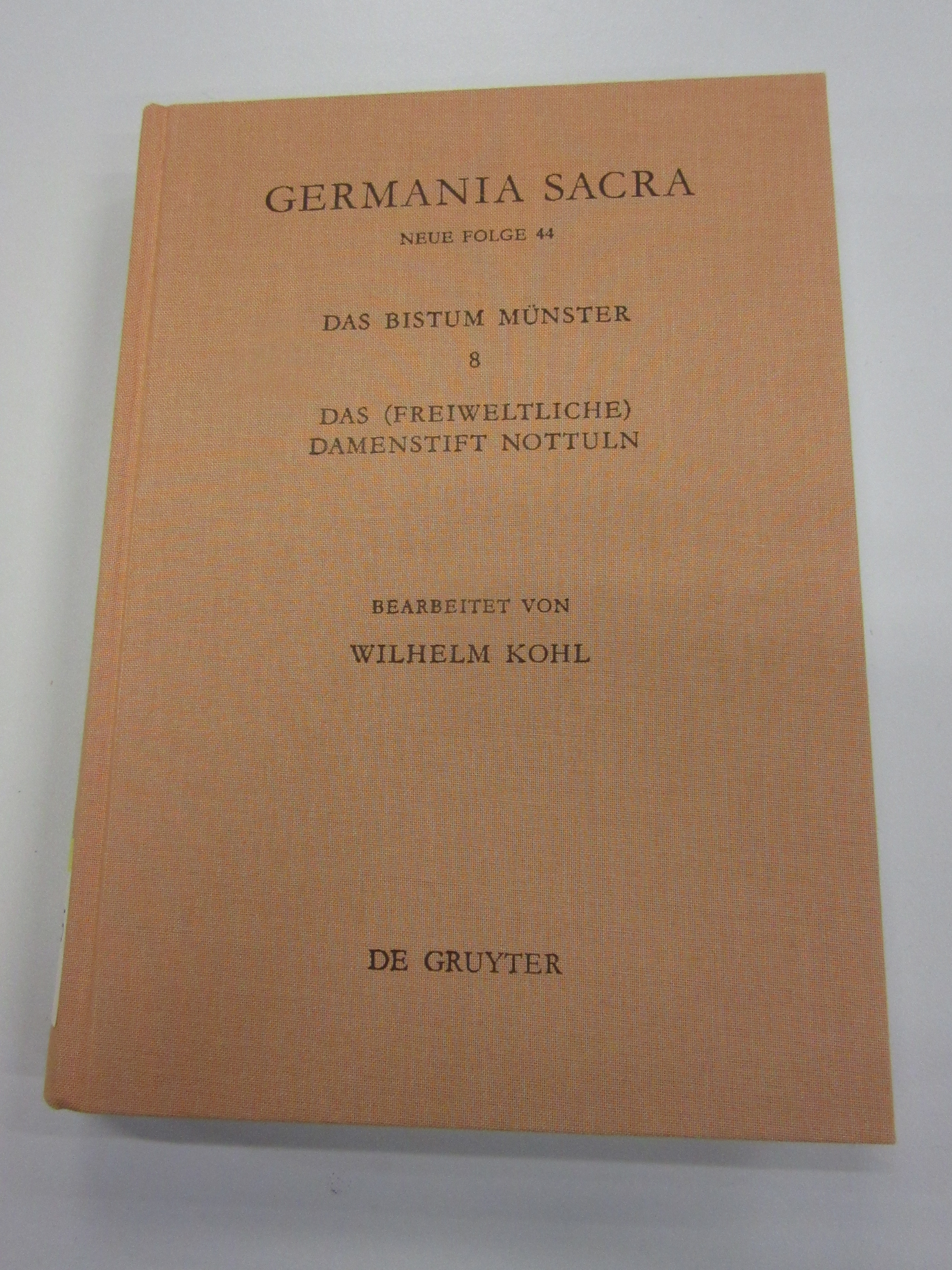 Buch der Germania Sacra